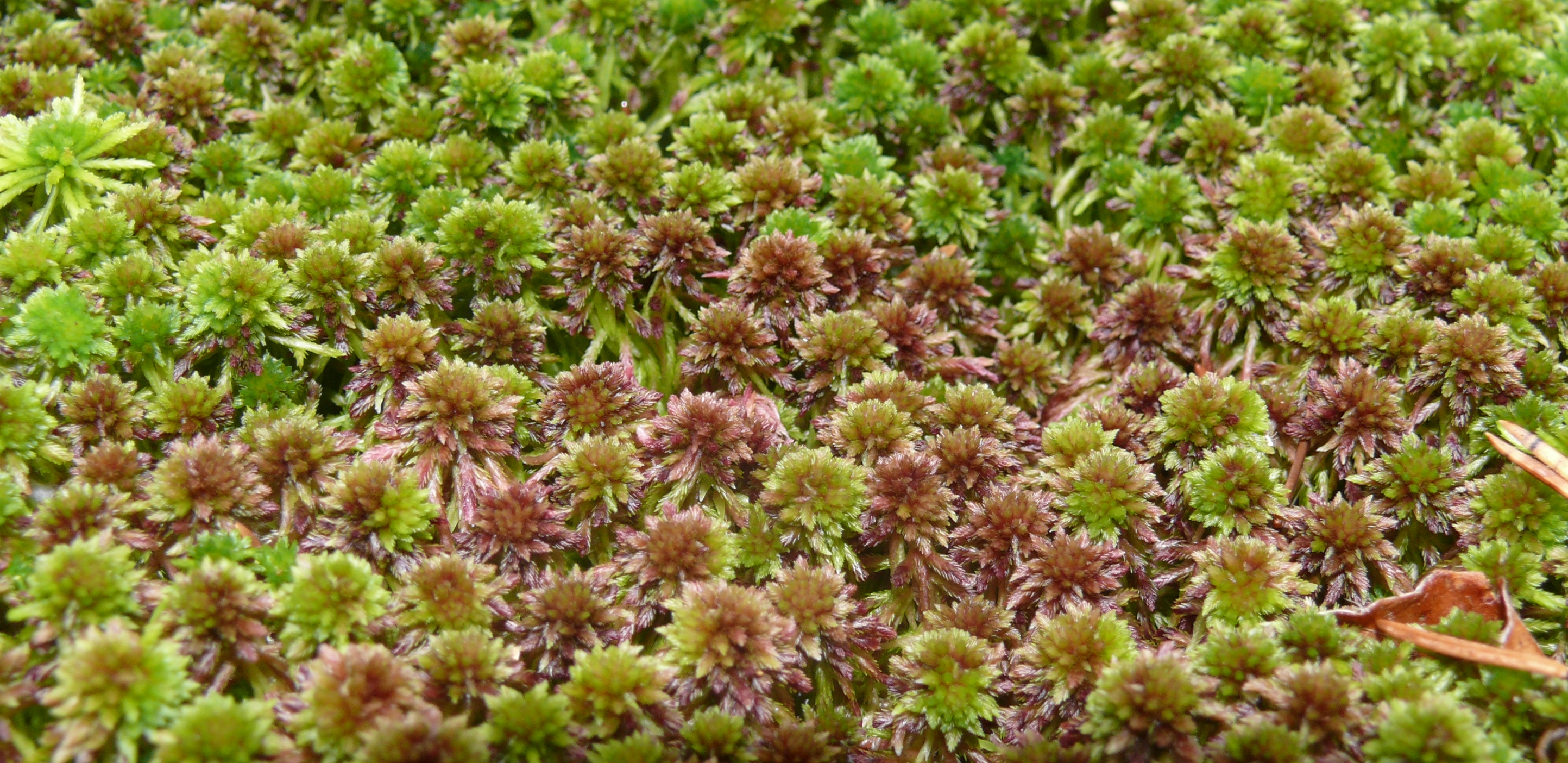 Spagnum capillifolium, Schwäbisch-Fränkische Waldberge, Germany